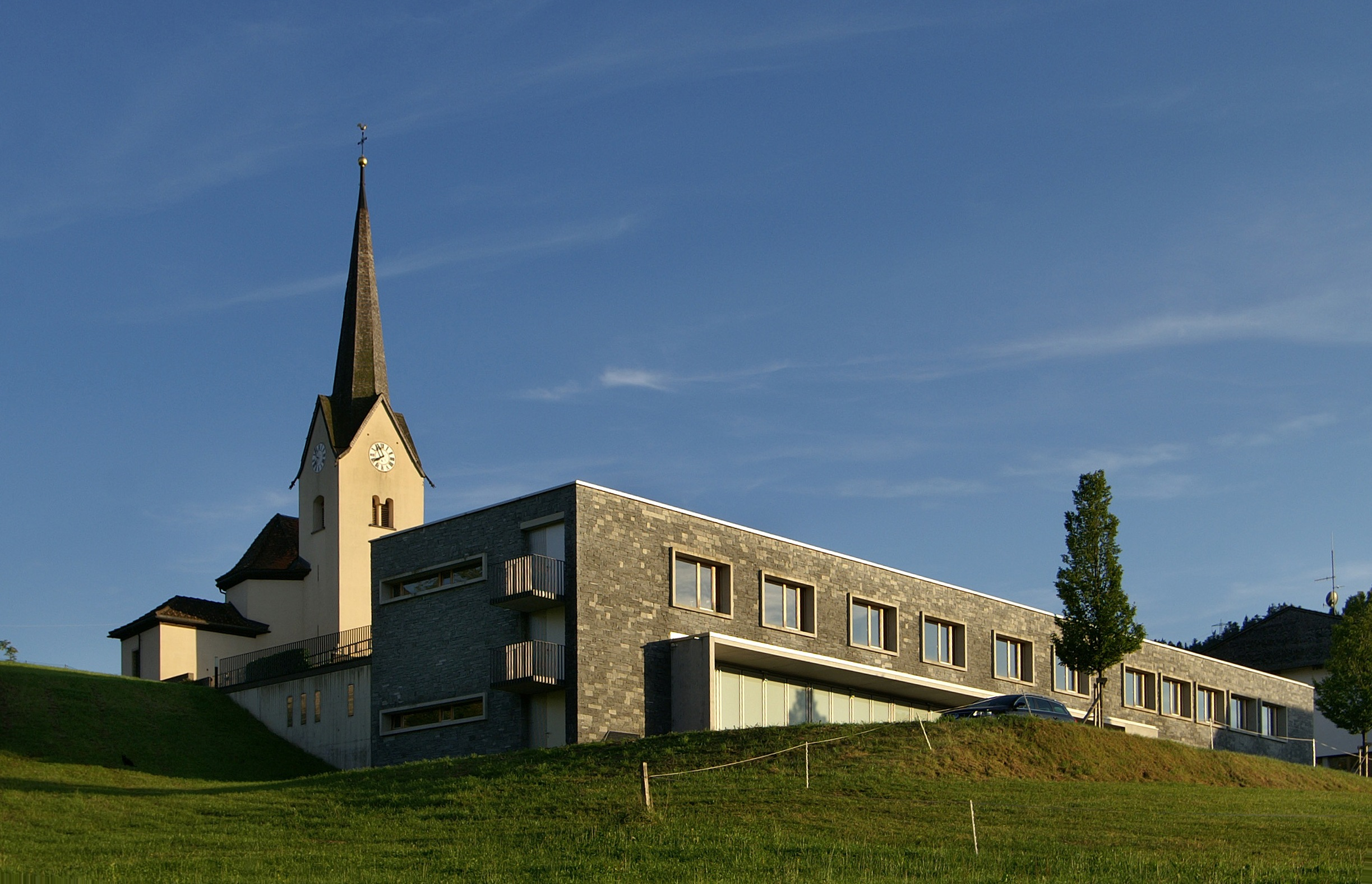 Pfarrkirche Hll. Petrus und Paulus in Buch, daneben das neue Gemeindeamt. Erbaut 2004 von walser + werle architekten zt gmbh.